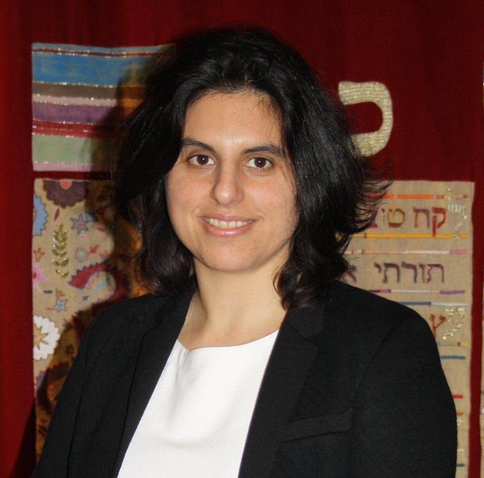 Floriane Chinsky